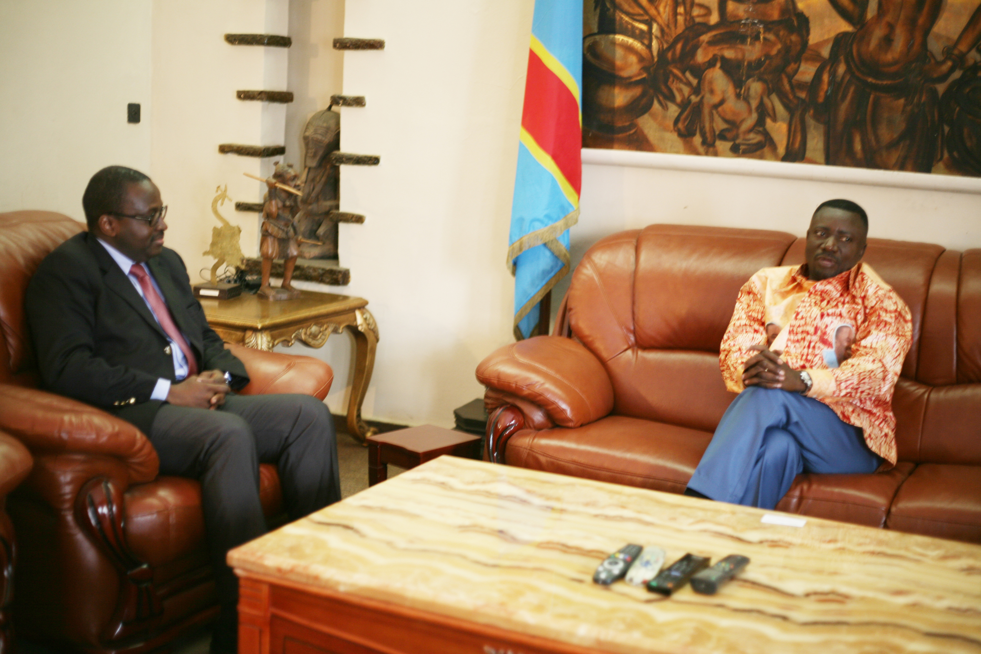 DSRSG Sarassoro’s Mission to Mbuji Mayi Saturday, 26 November 2011 Le Directeur de la DE MONUSCO Mathieu Bile, le Directeur adjoint de la DE a NYHQ A-Tadjoudine et le CNMPE Comité National de Médiation du Processus Electoral. Photo MONUSCO / Myriam Asmani